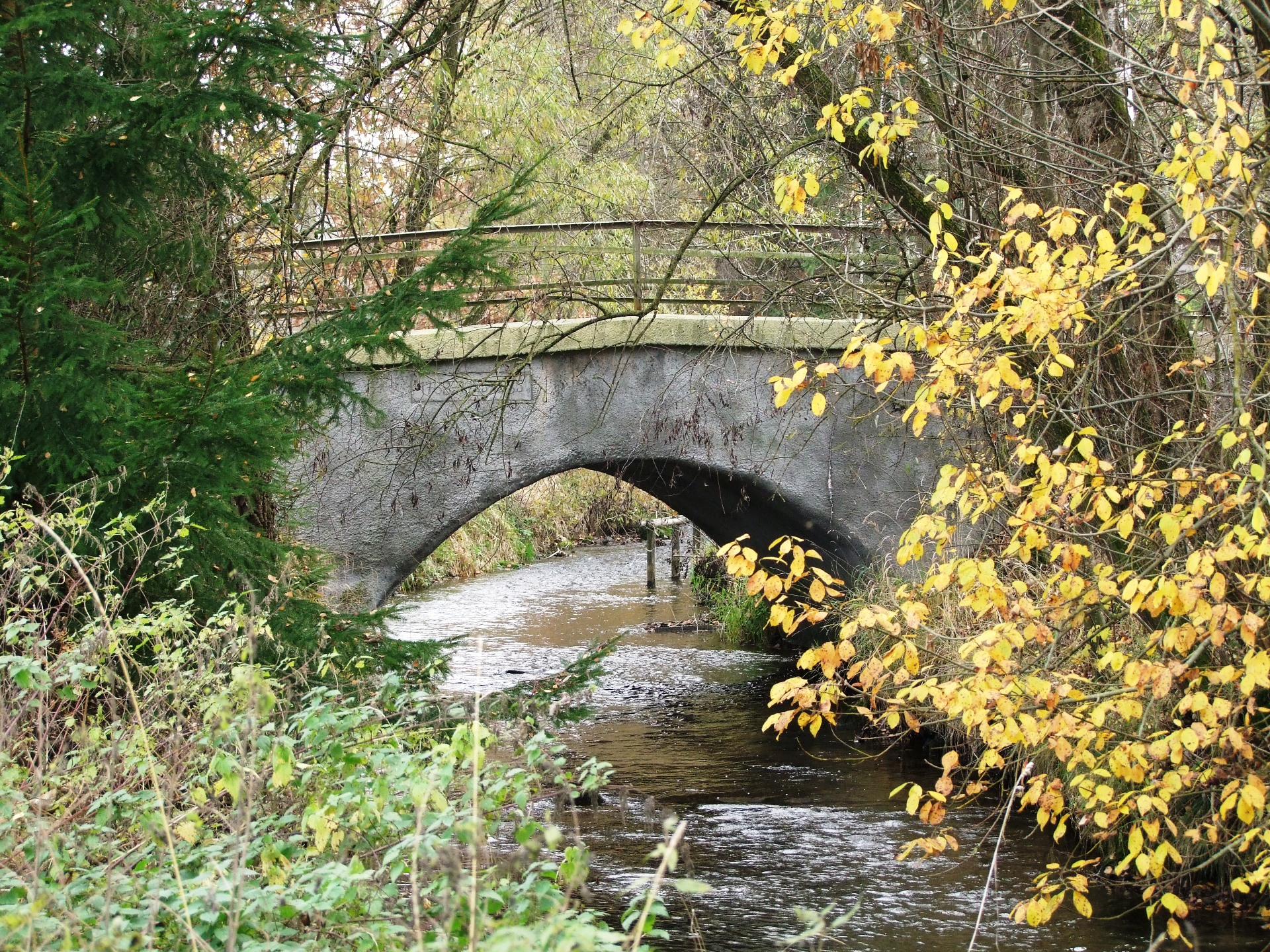 Die Buxach in Buxach.